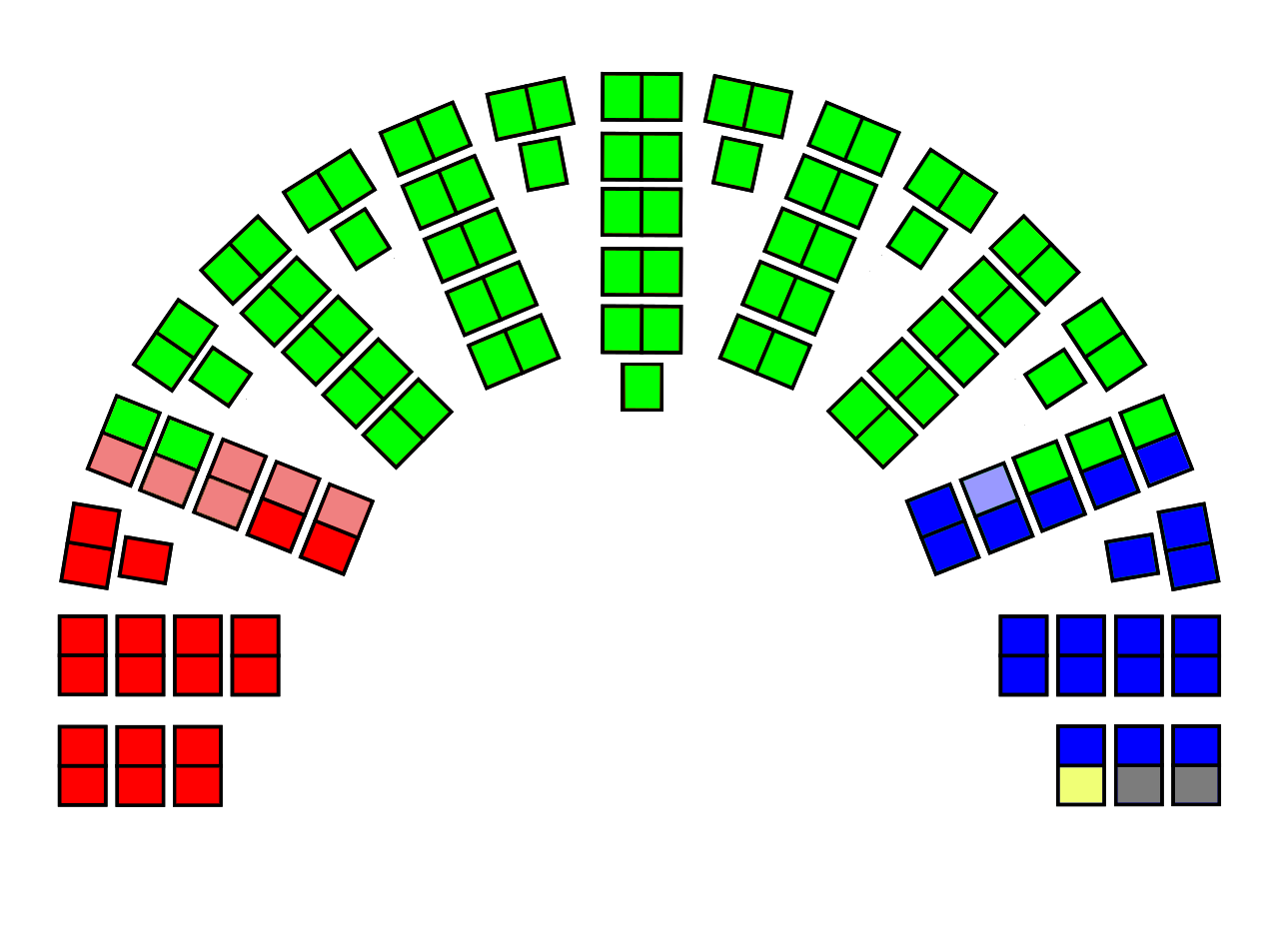 Mandatfordelingen etter Stortingsvalget 1915 illustrert med seter Arbeiderpartiet Norsk Landmandsforbund Radikale Folkeparti Venstre Høyre Avholdspartiet Uavhengige